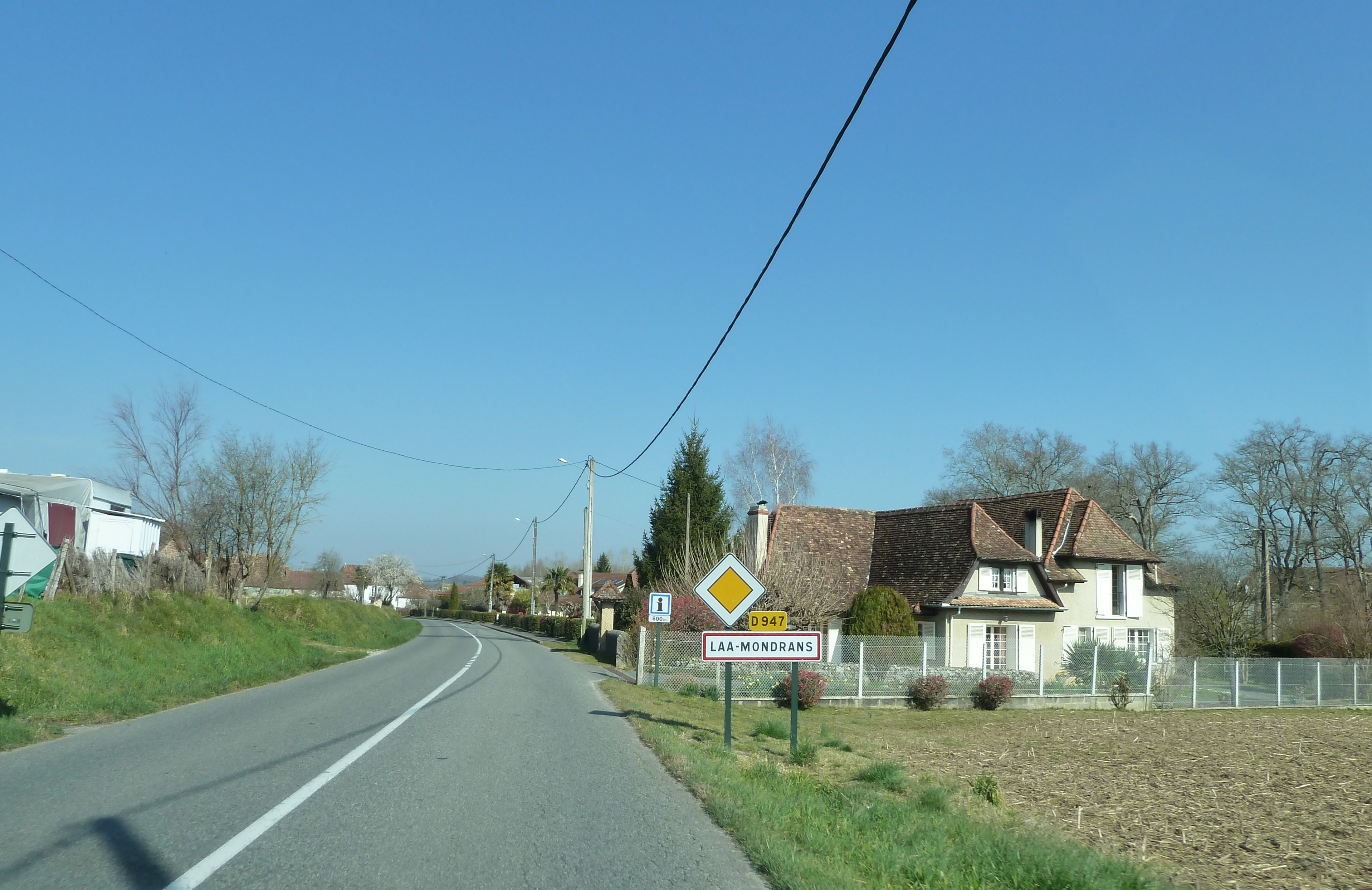 Laà-Mondrans le 18 juillet 2010, France.